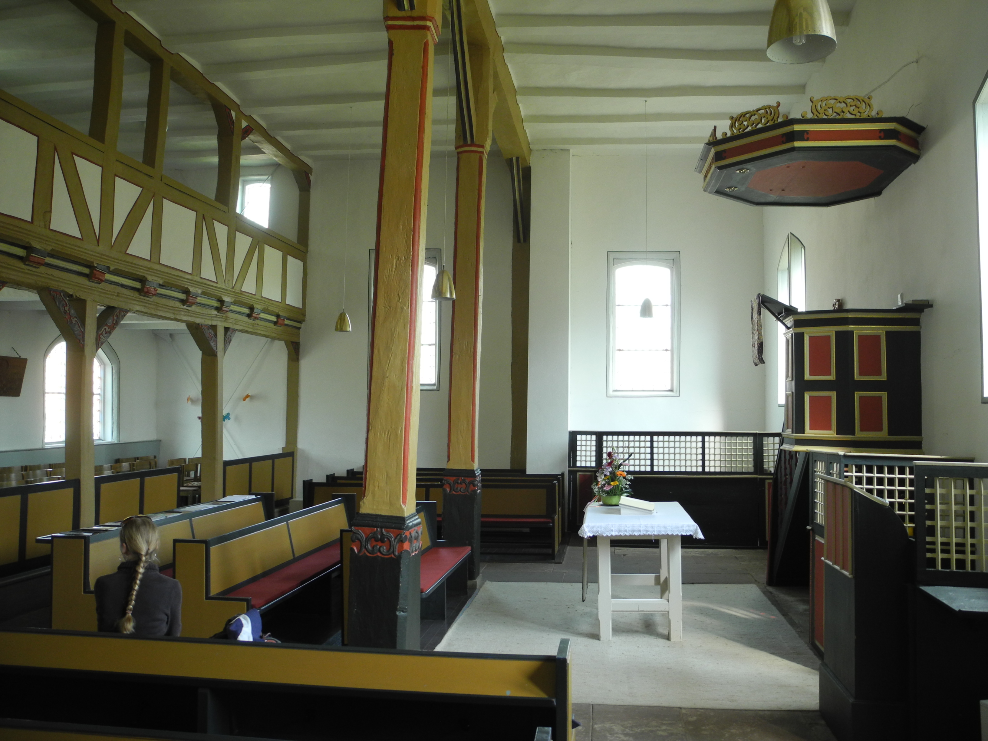 Hugenottenkirche in Carlsdorf, Innenraum.